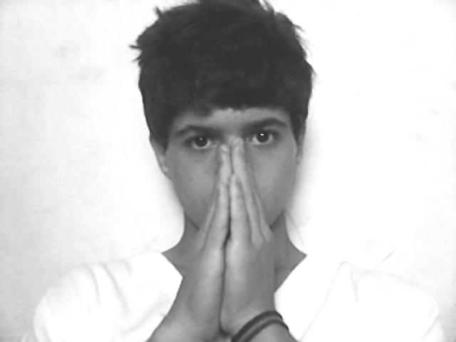 Drogas humanas